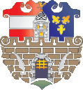 Wappen der Gemeinde Hainfeld